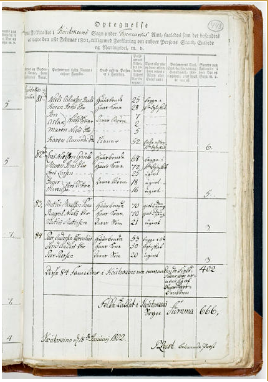 Side fra folketellingen i 1801